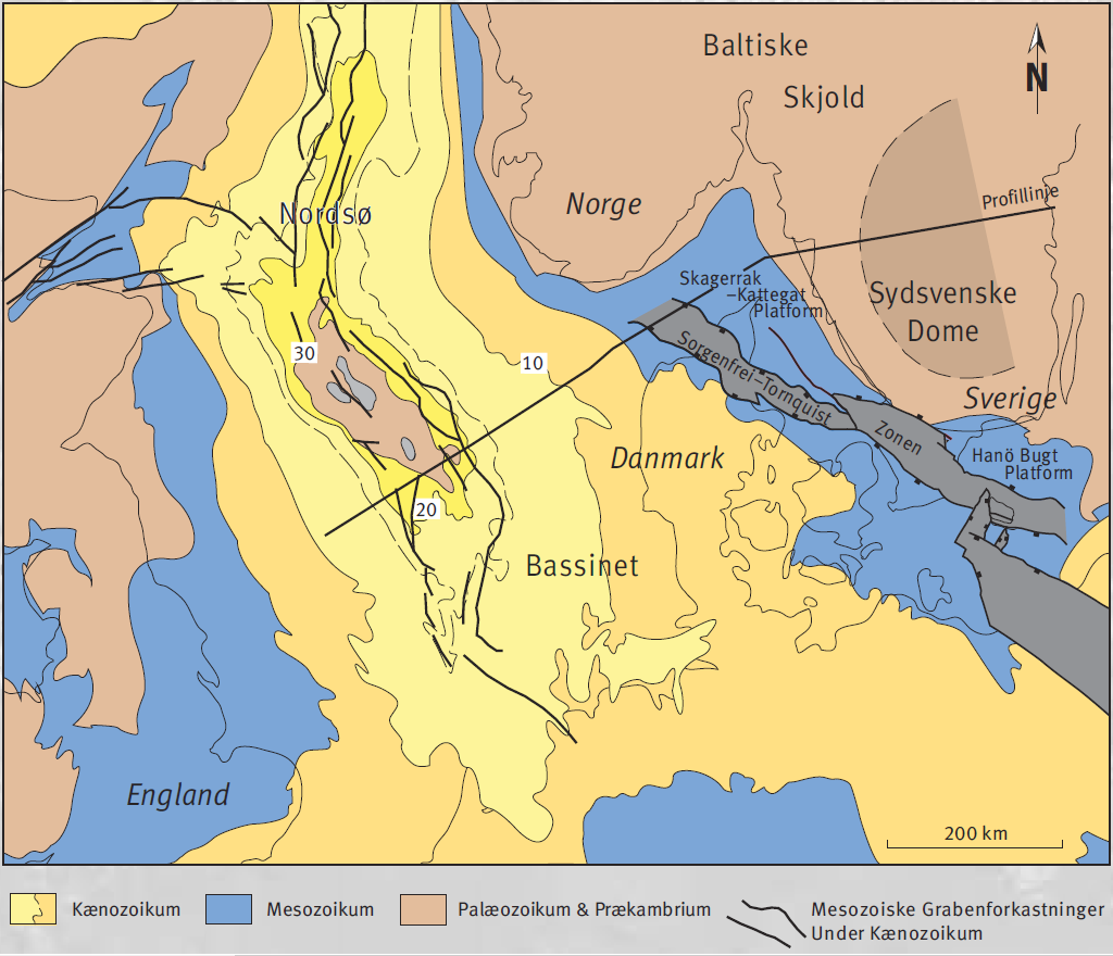 Geologiske strukturer i det østlige Nordsø Bassin, side 6